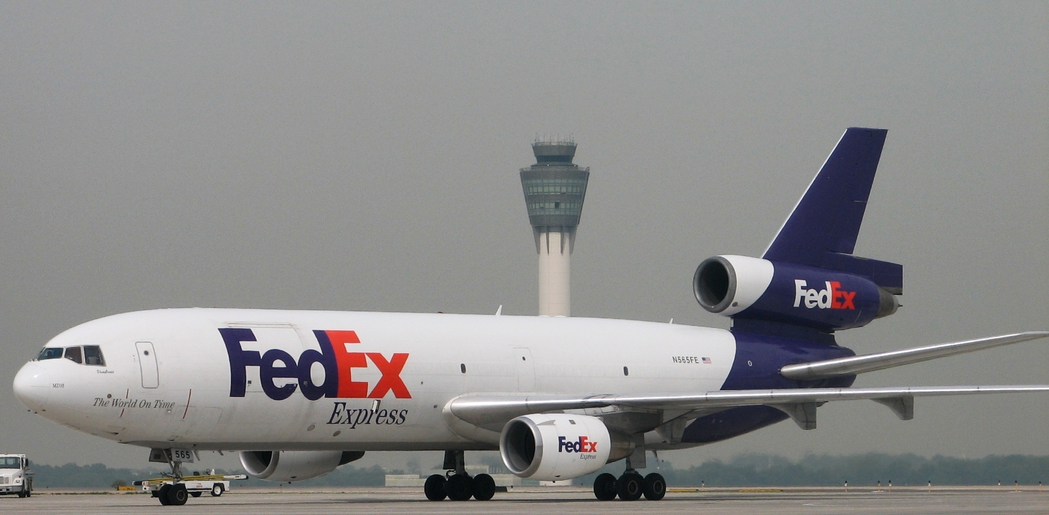 MD-10 taxi at KIND